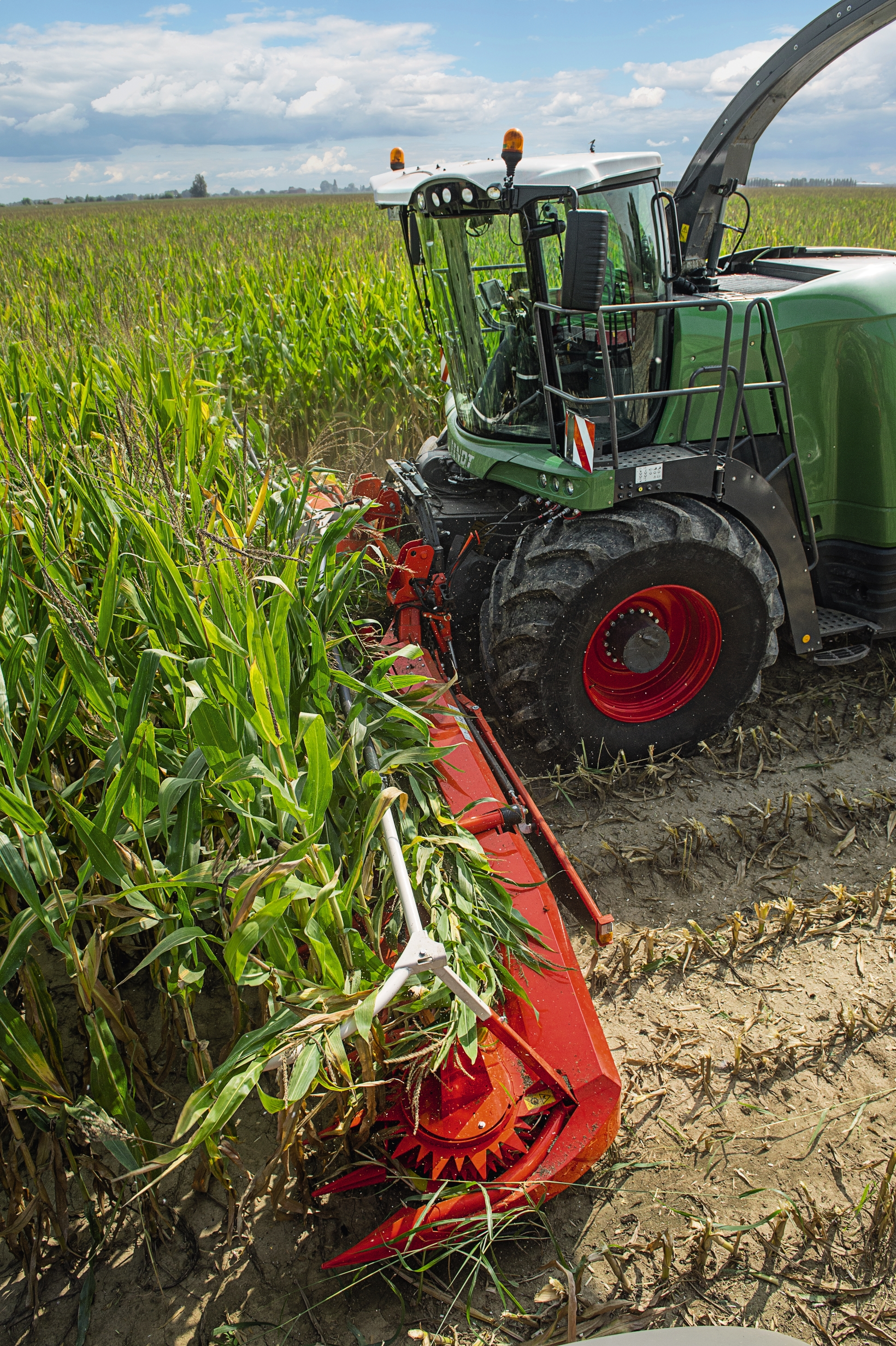 Fendt Katana 85 im Maiseinsatz